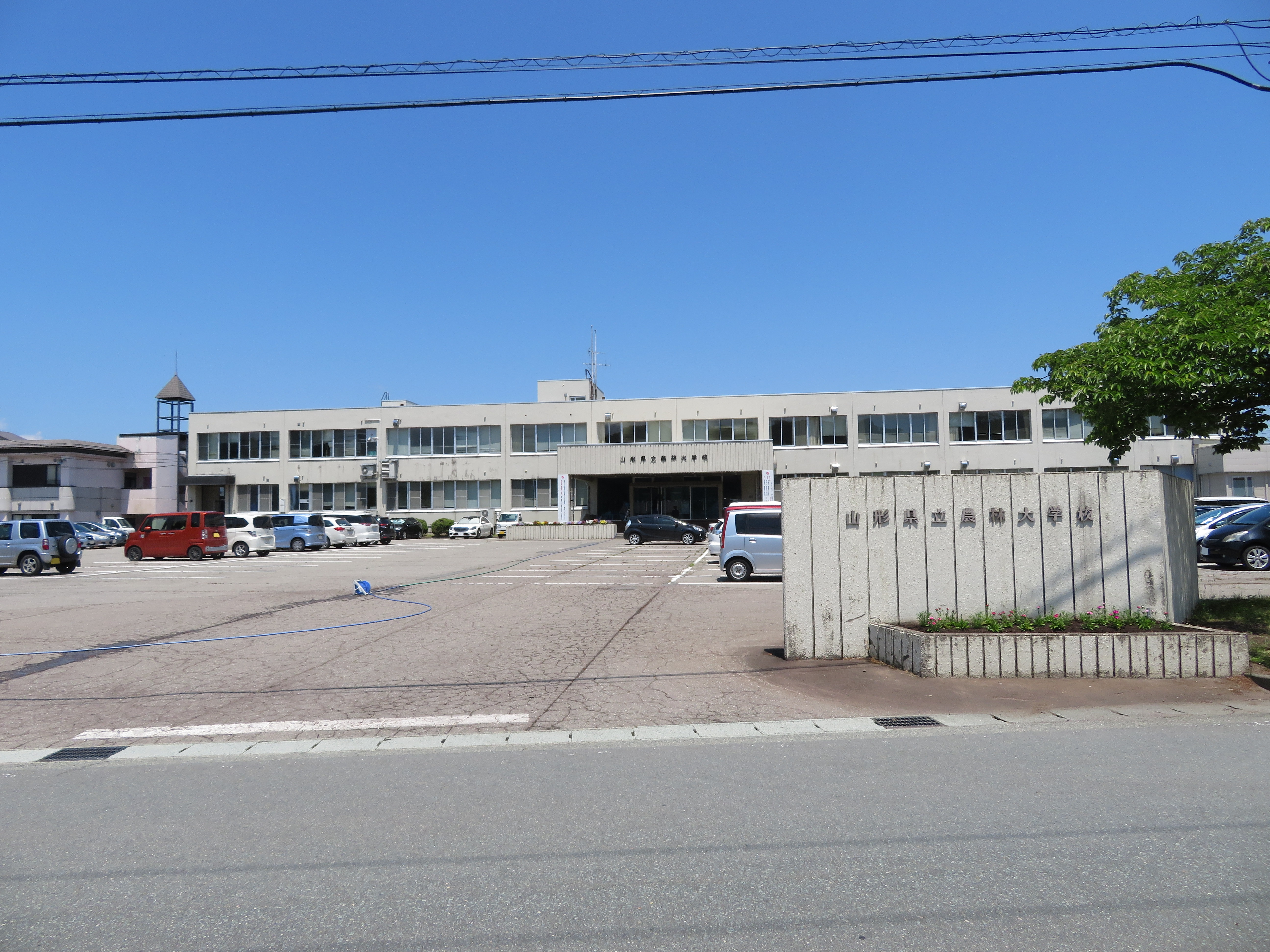 山形県新庄市に所在する山形県農業大学校